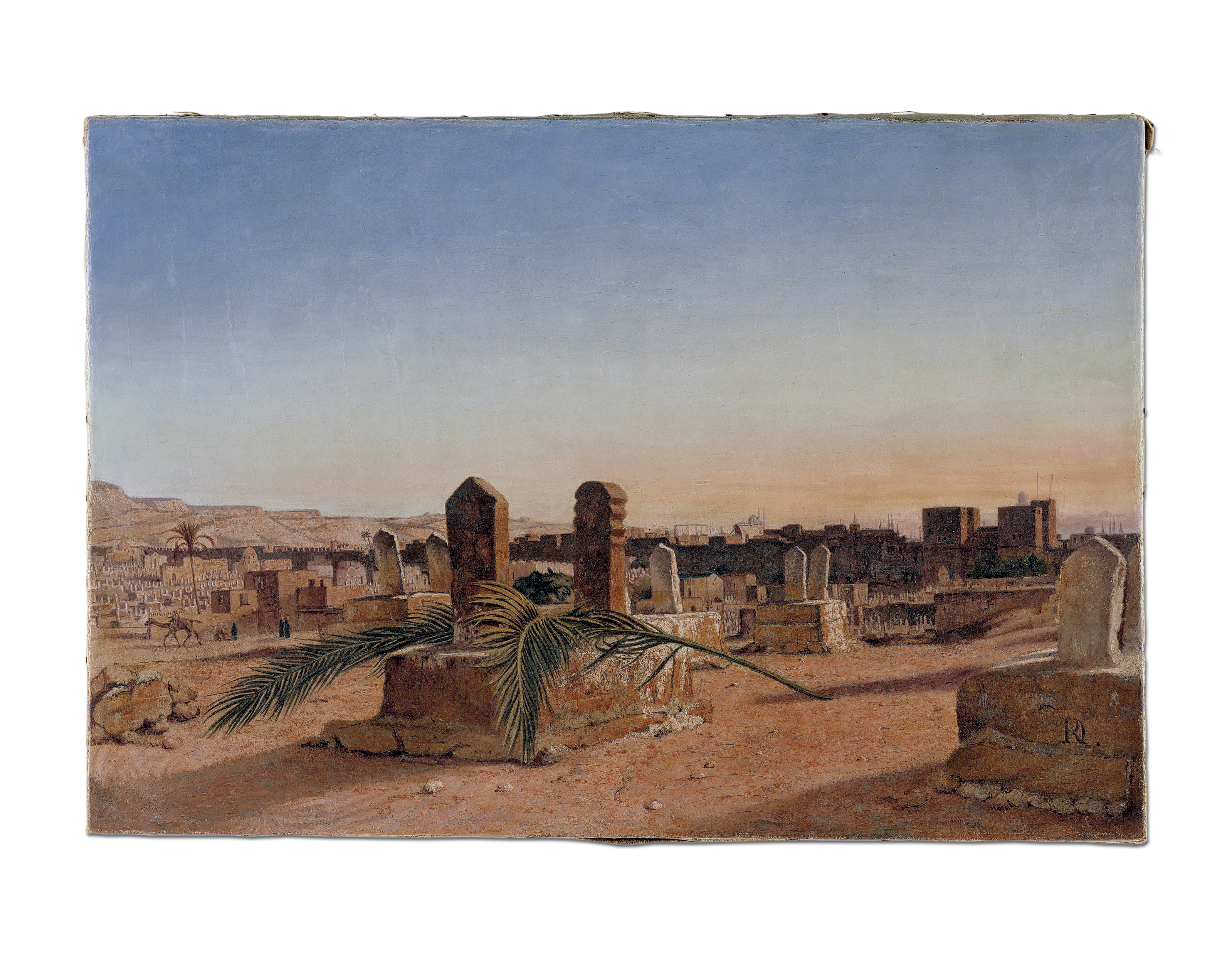 LangSwitch Error: no default